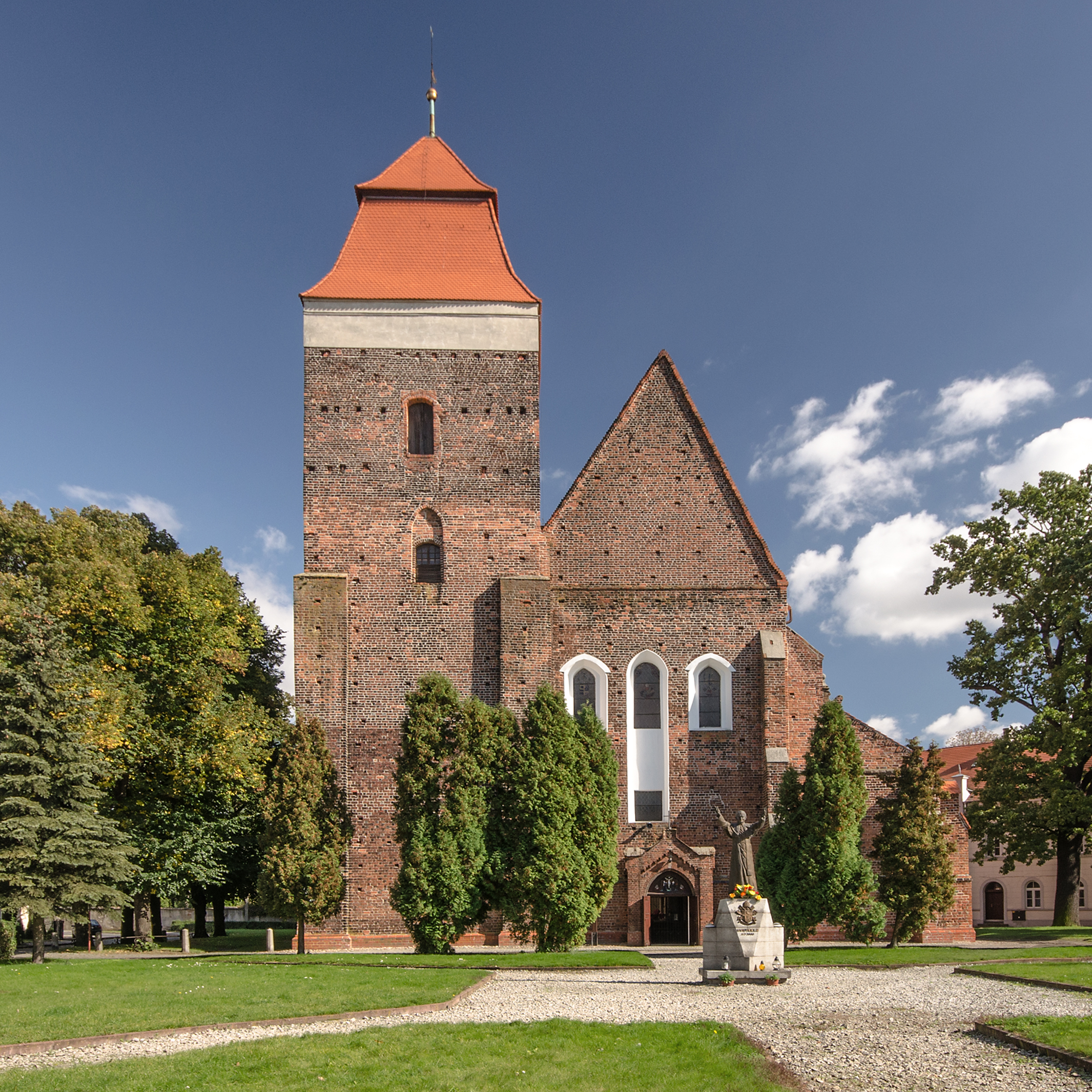 Bierutów, kościół ewangelicki, ob. rzym.-kat. fil. p.w. św. Katarzyny, ok. 1300, XVI, XX